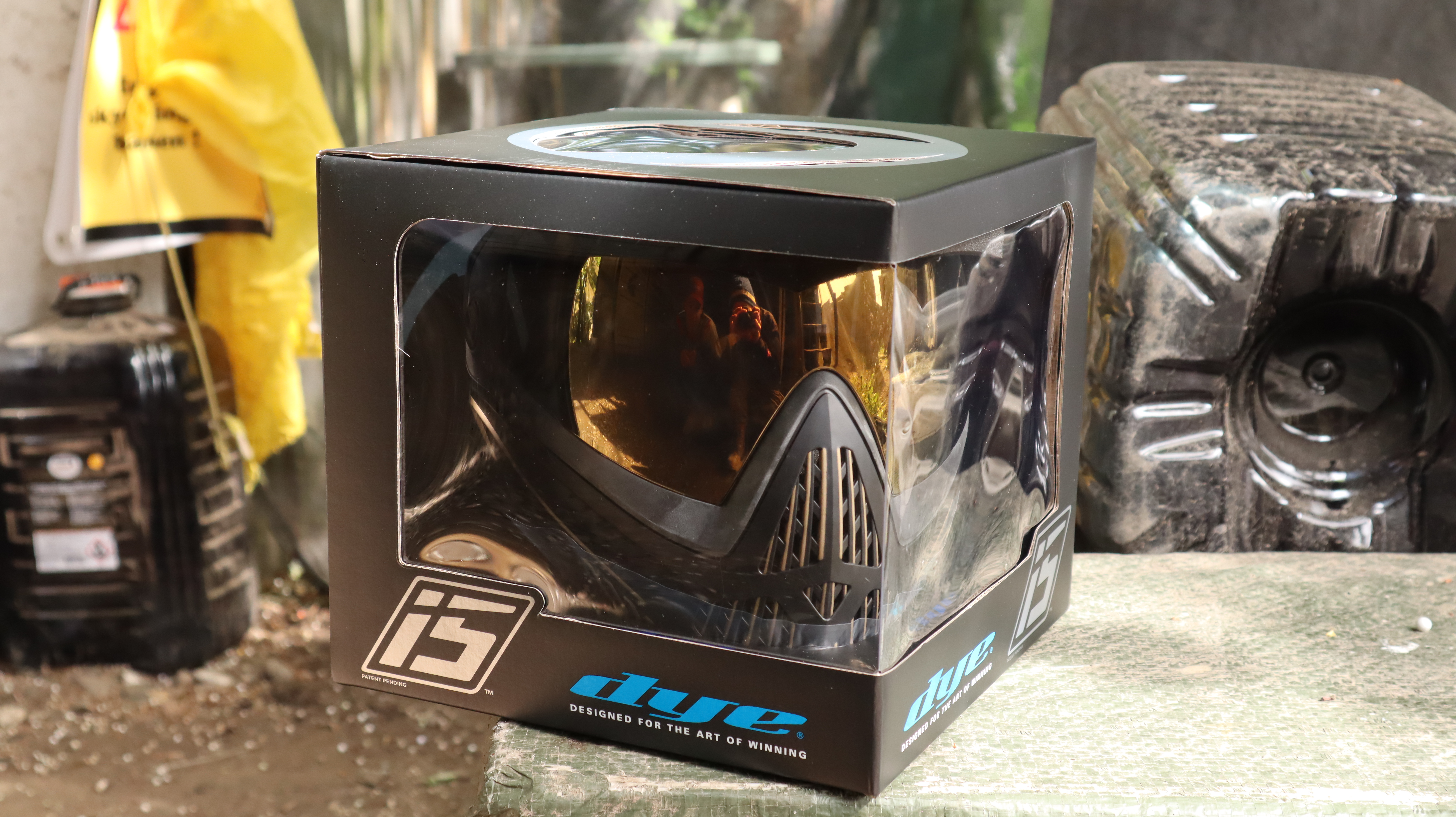 I5 dye mask for paintball and airsoft.